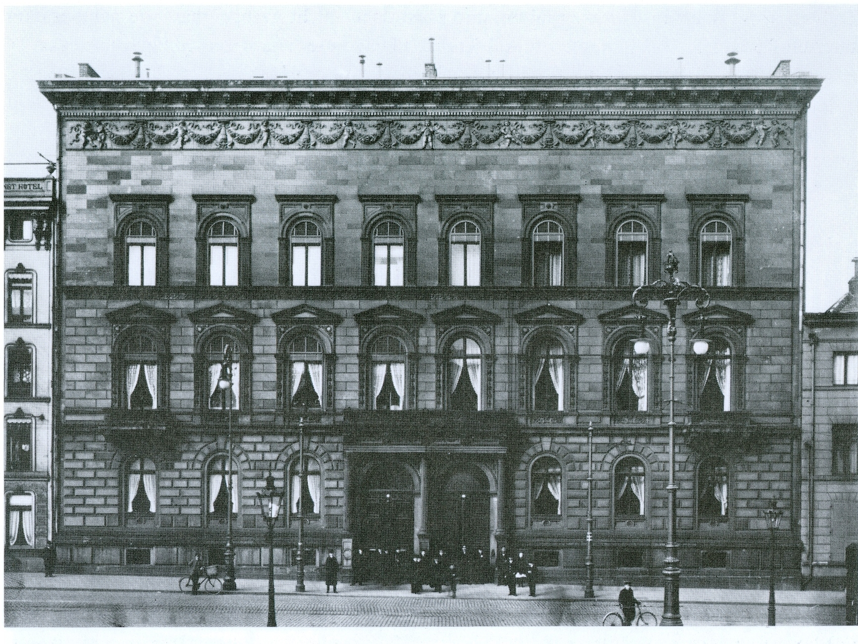 Palais Deichmann in Köln, Trankgasse 7; erbaut 1867 nach Entwurf von Hermann Pflaume für den Bankier Deichmann; 1912 abgebrochen